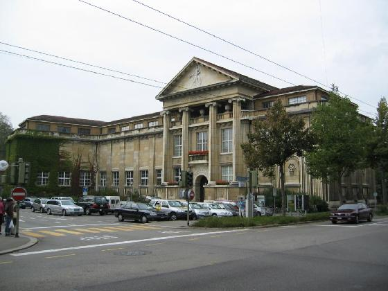 Bibliotheks- und Museumsgebäude, Winterthur